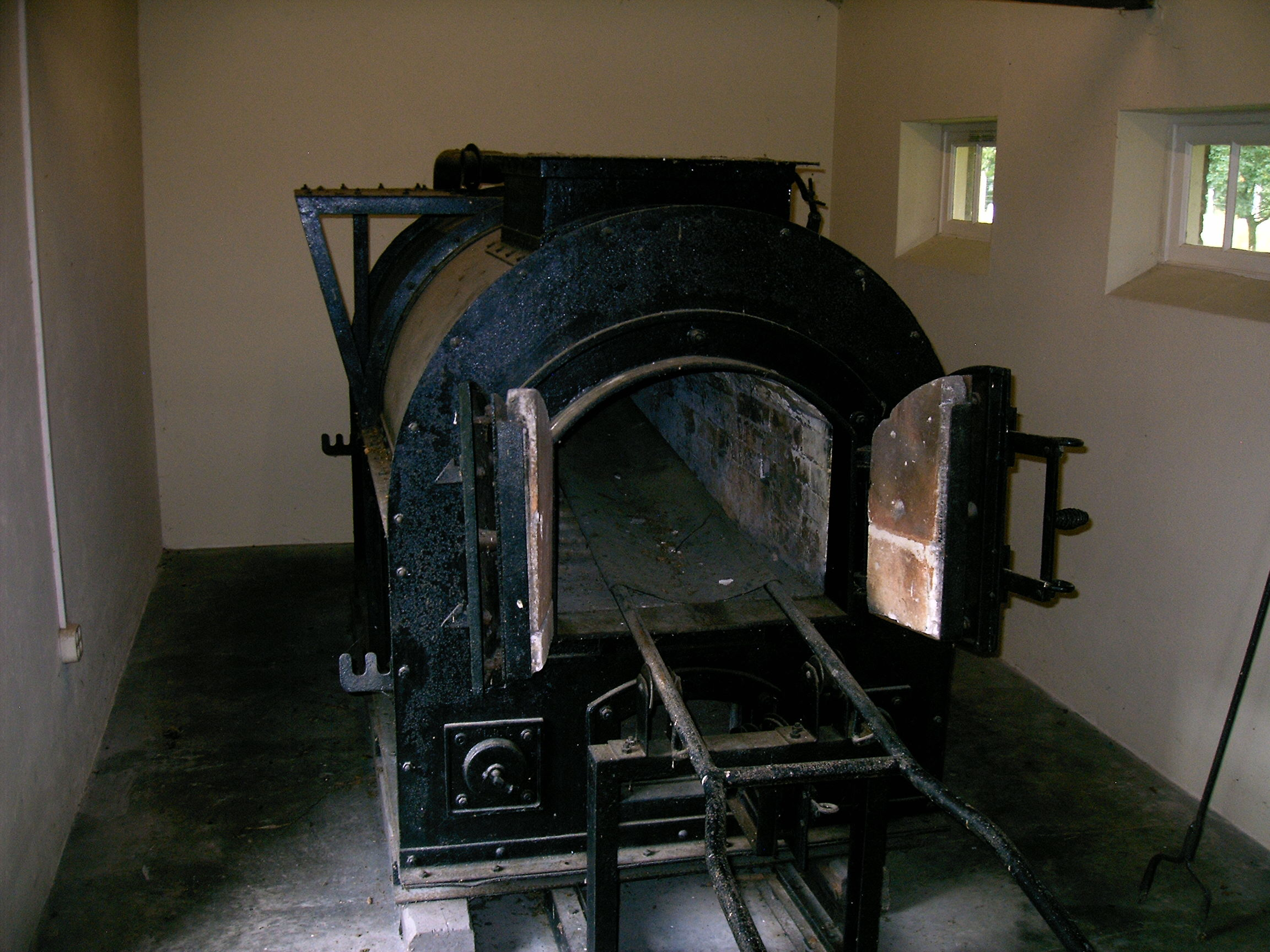 Nationaal monument kamp Vught, Mobiel Crematorium